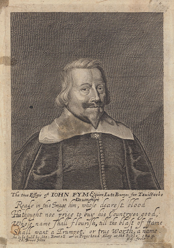 John Pym (* 1584; † 1643), Jurist und Wortführer der Parlamentspartei im englischen Unterhaus zur Zeit Karls I.